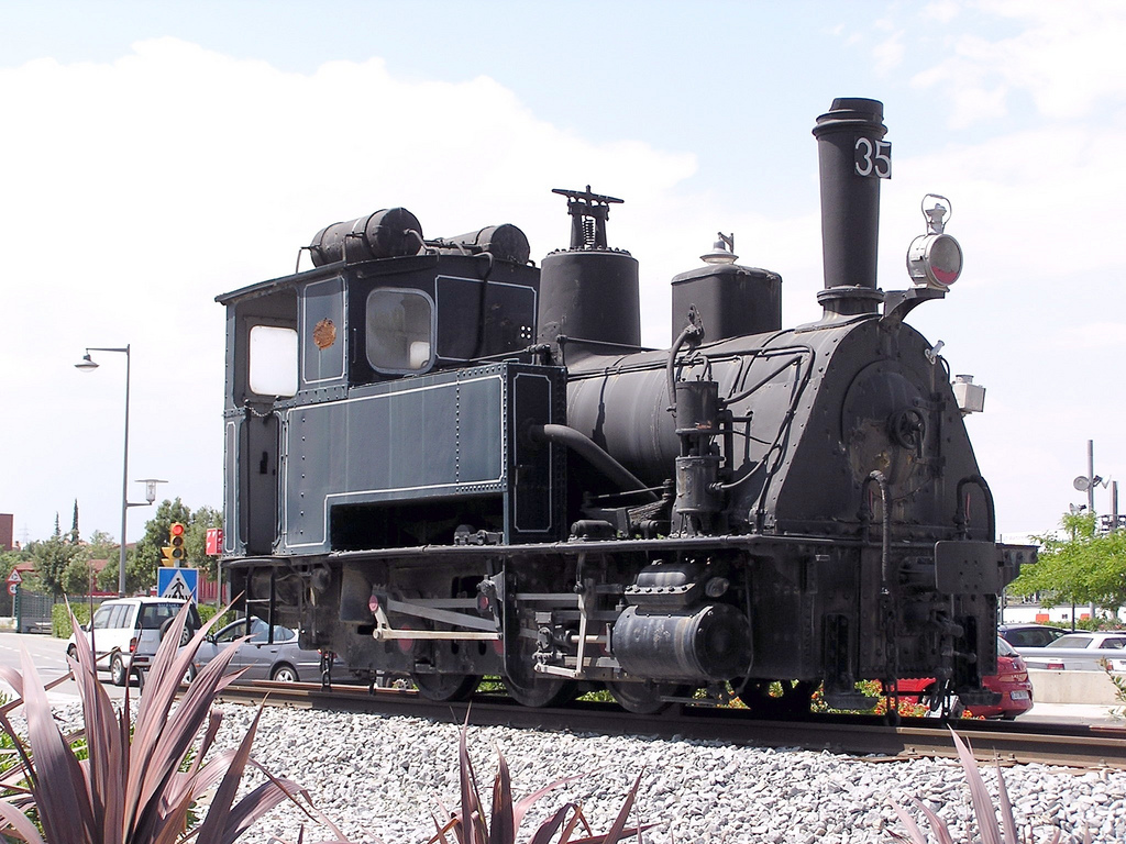 Locomotora "Berga" a Martorell, devant de l'estació de Martorell-Enllaç. Fabricada a La Maquinista.